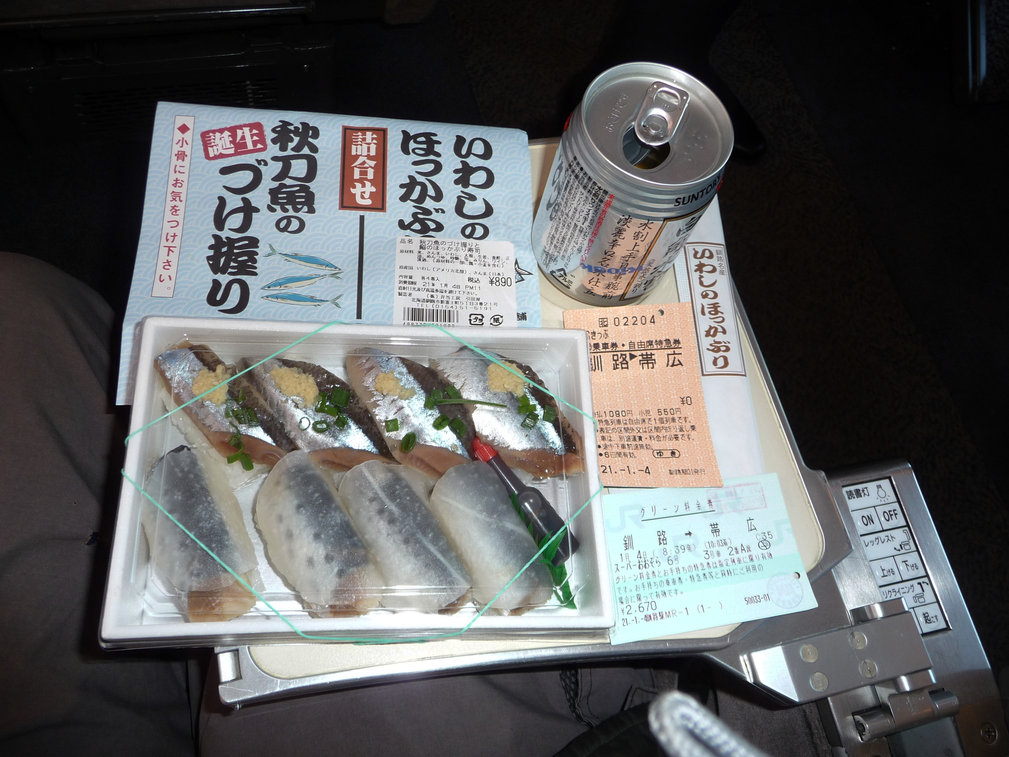 釧路駅の駅弁、秋刀魚のづけ握りと鰯のほっかぶり寿司